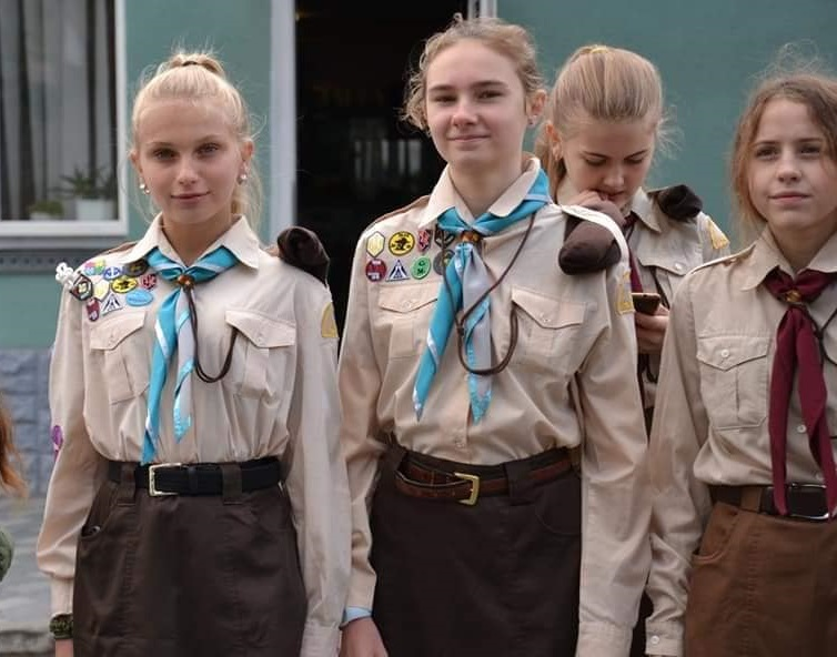 Пластунки на Святі Весни